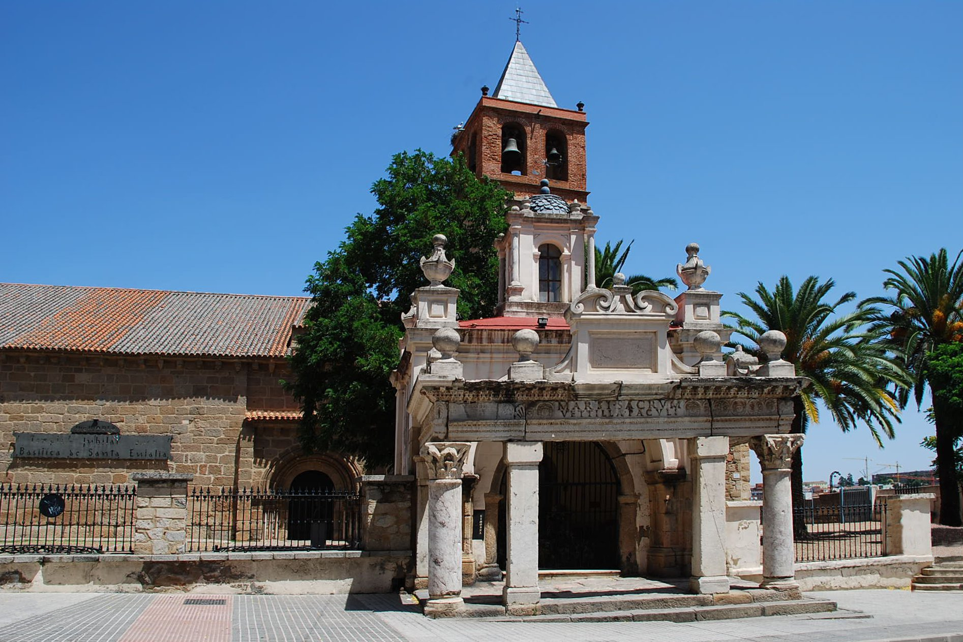 Basílica de Santa Eulalia en Mérida, provincia de Badajoz (España).